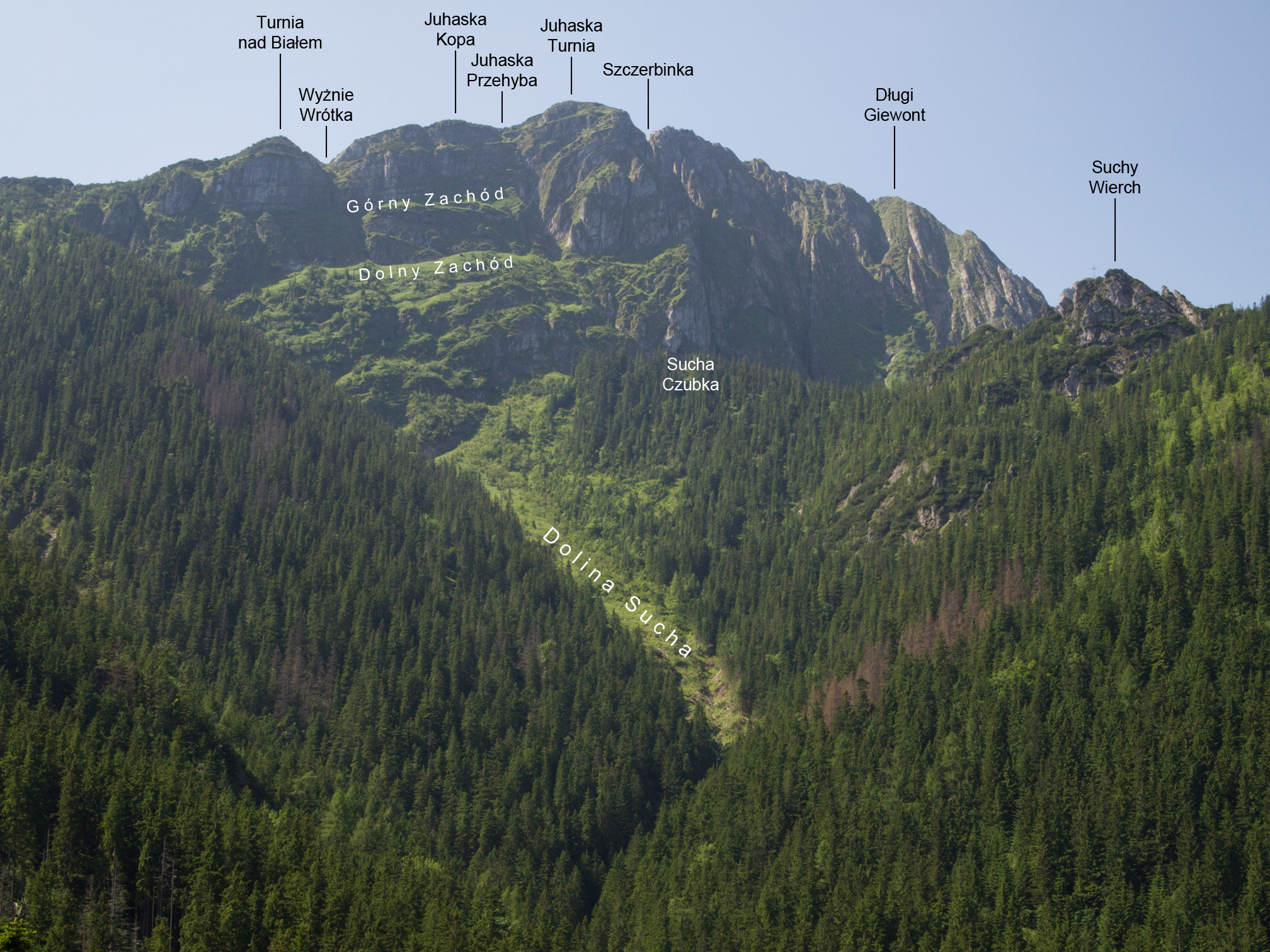 Masyw Długiego Giewontu.